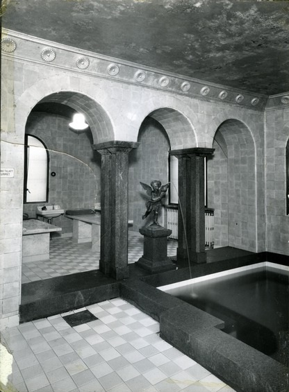 Torggata bad. Badstue Avdelingen for menn med avkjølingsbasseng og marmorbenker for massasje og såpevask. Skulpturen Badeengel som ble flyttet til Bislett bad etter nedleggelsen i 1980. Vinduer mot bakgård og Badstugata.